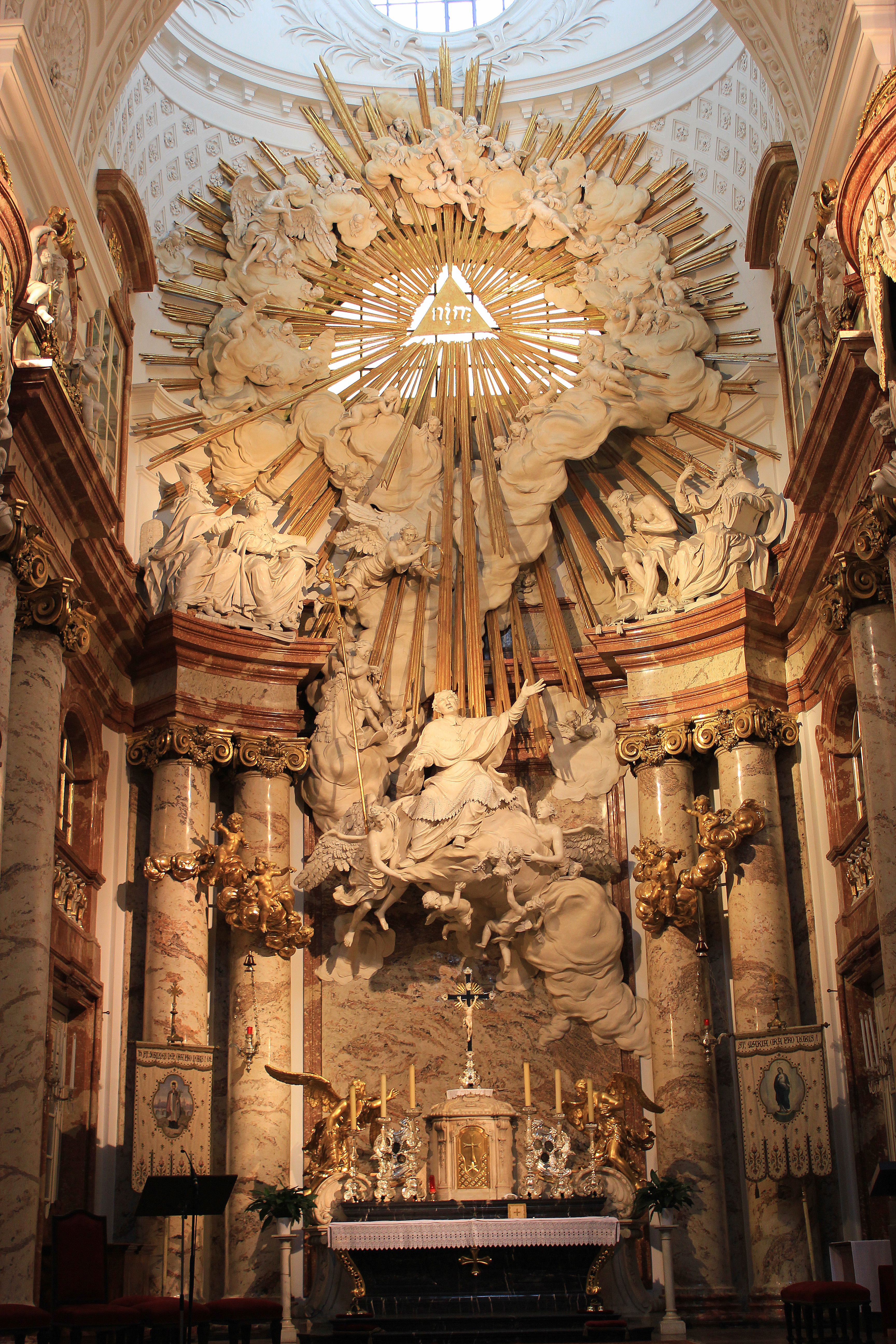 Altar de Iglesia de San Carlos de Borromeo